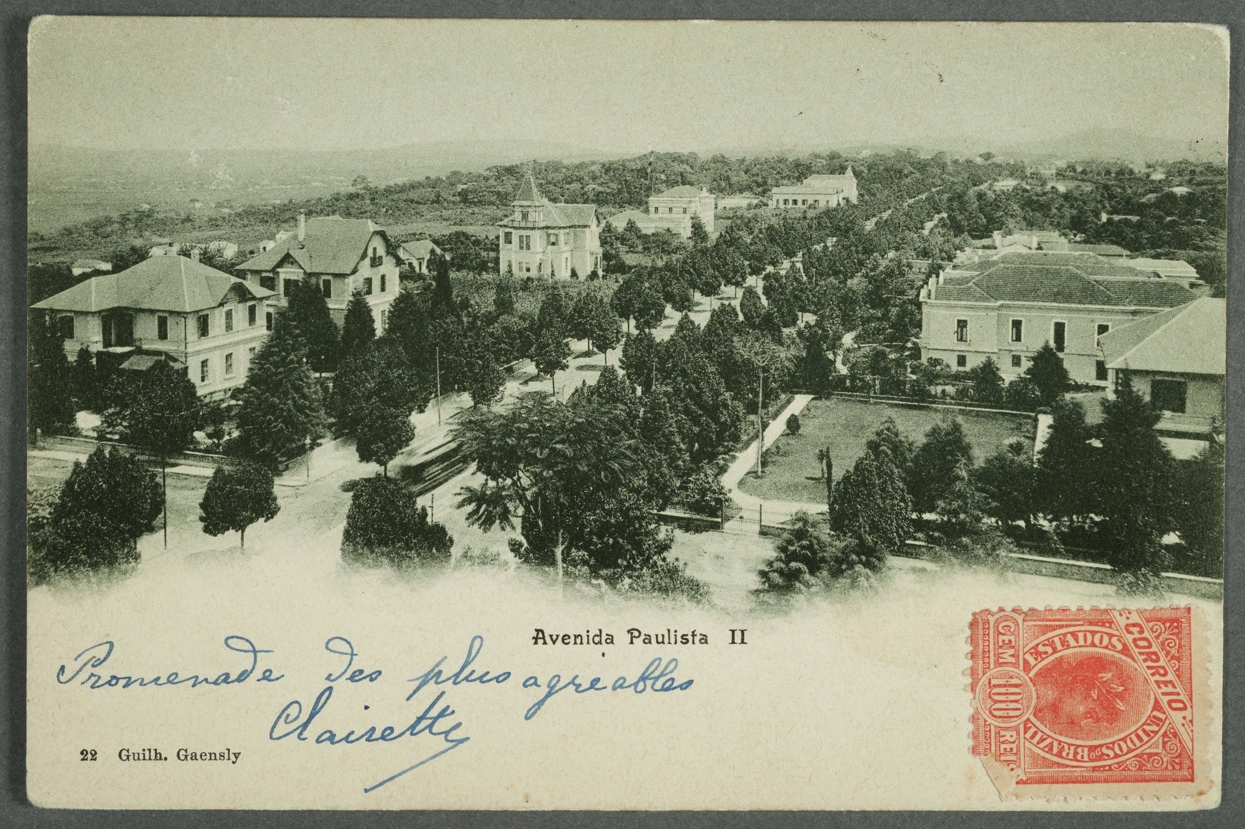 Obra que integra o acervo do Museu Paulista da USP.